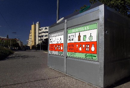 Doppelkammerbehälter für die Altglassammlung in Österreich: 1 Behälter mit 2 Innenkammern für die optimale, sortenreine Altglassammlung und die rasche Entleerung des Altglases aus dem Behälter in ein Sammelfahrzeug